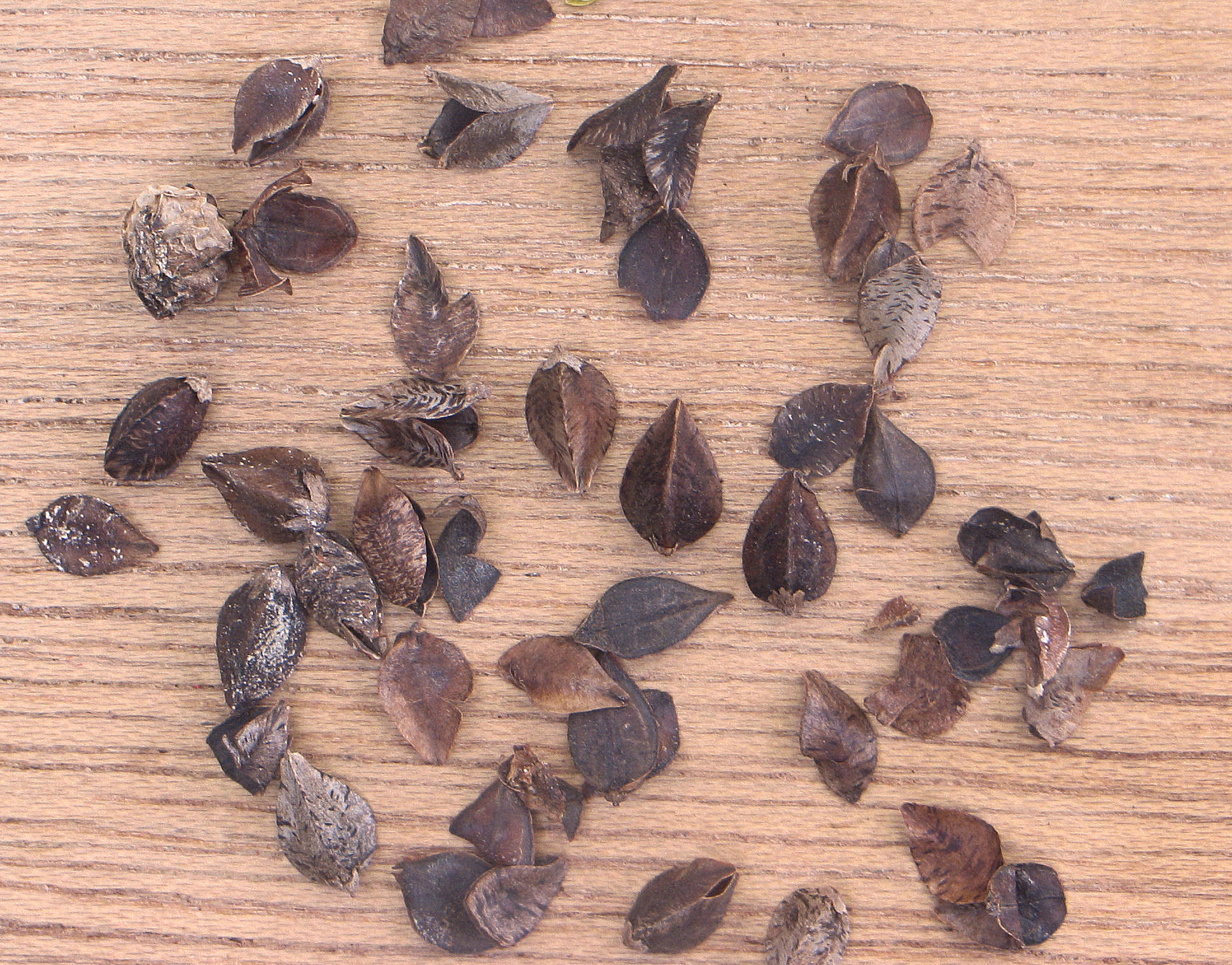 Fagopyrum esculentum seeds (boekweit)